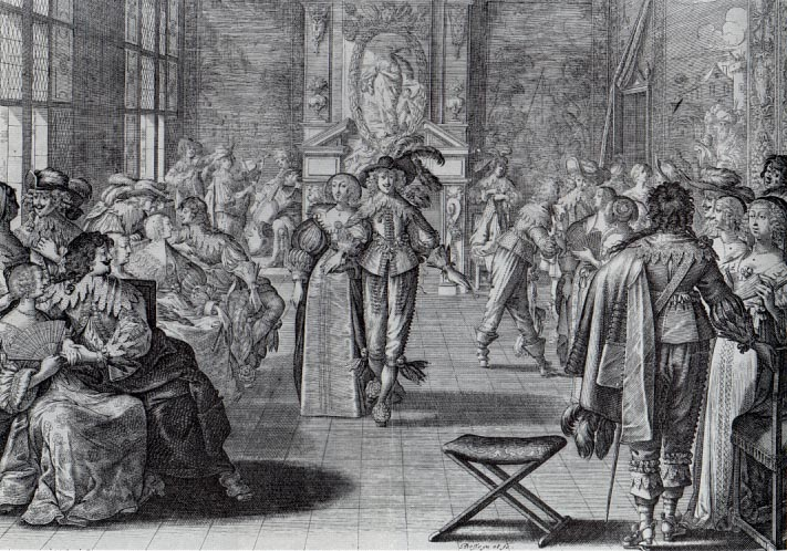 Le Blond d'après A. Bosse, Le Bal, 1ère moitié du XVIIe siècle, estampe, Paris, Bibliothèque nationale.